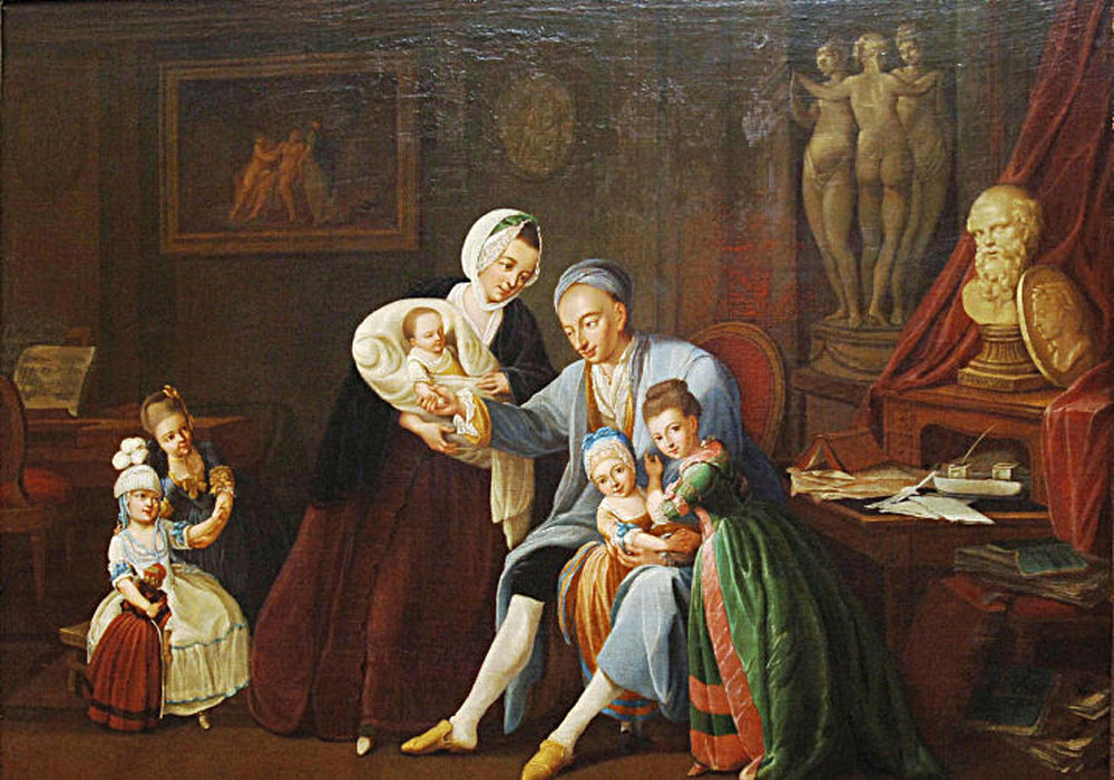 Christoph Martin Wieland im Kreis seiner Familie